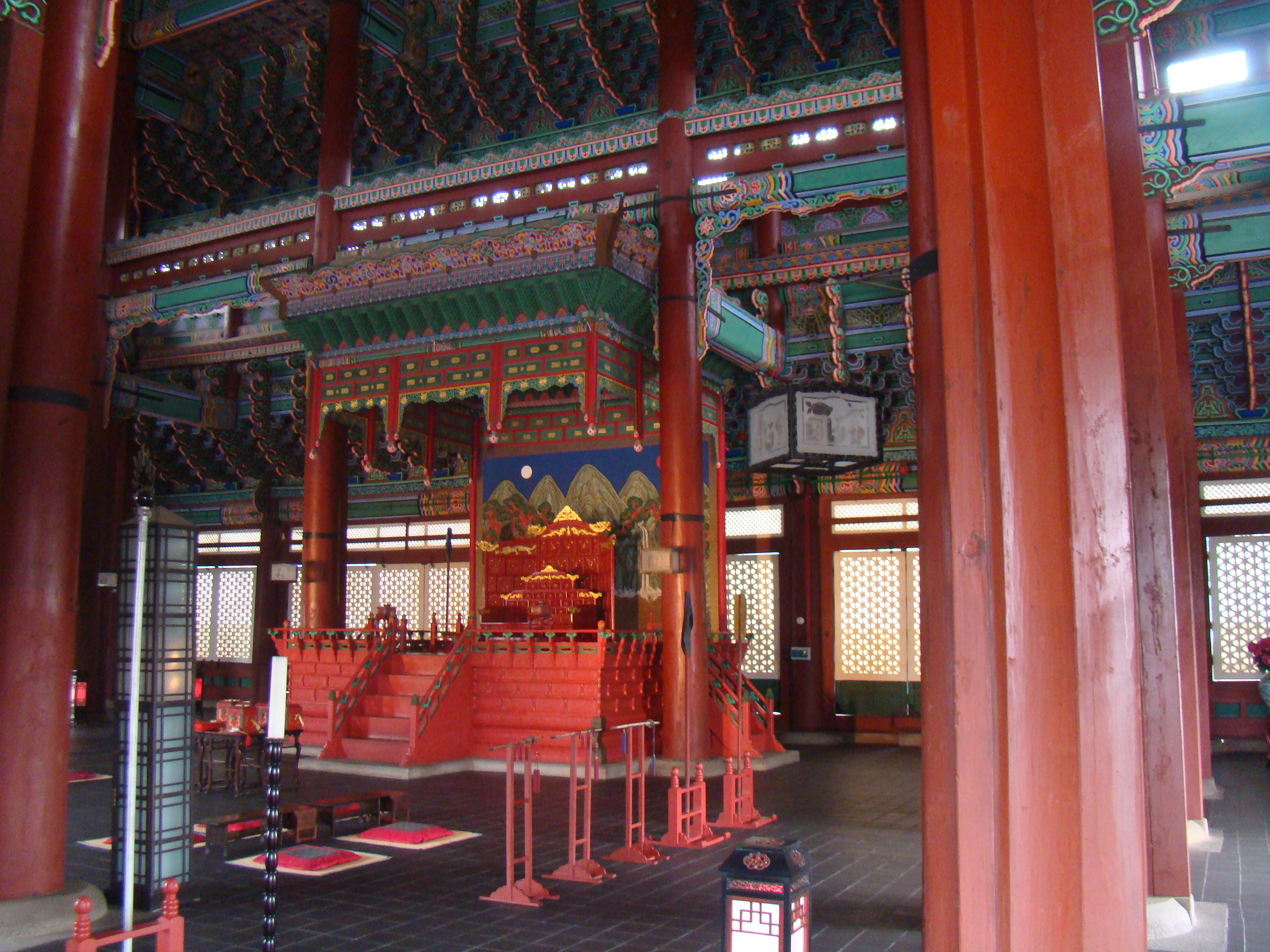 Đại điện trong Cảnh Phúc Cung.